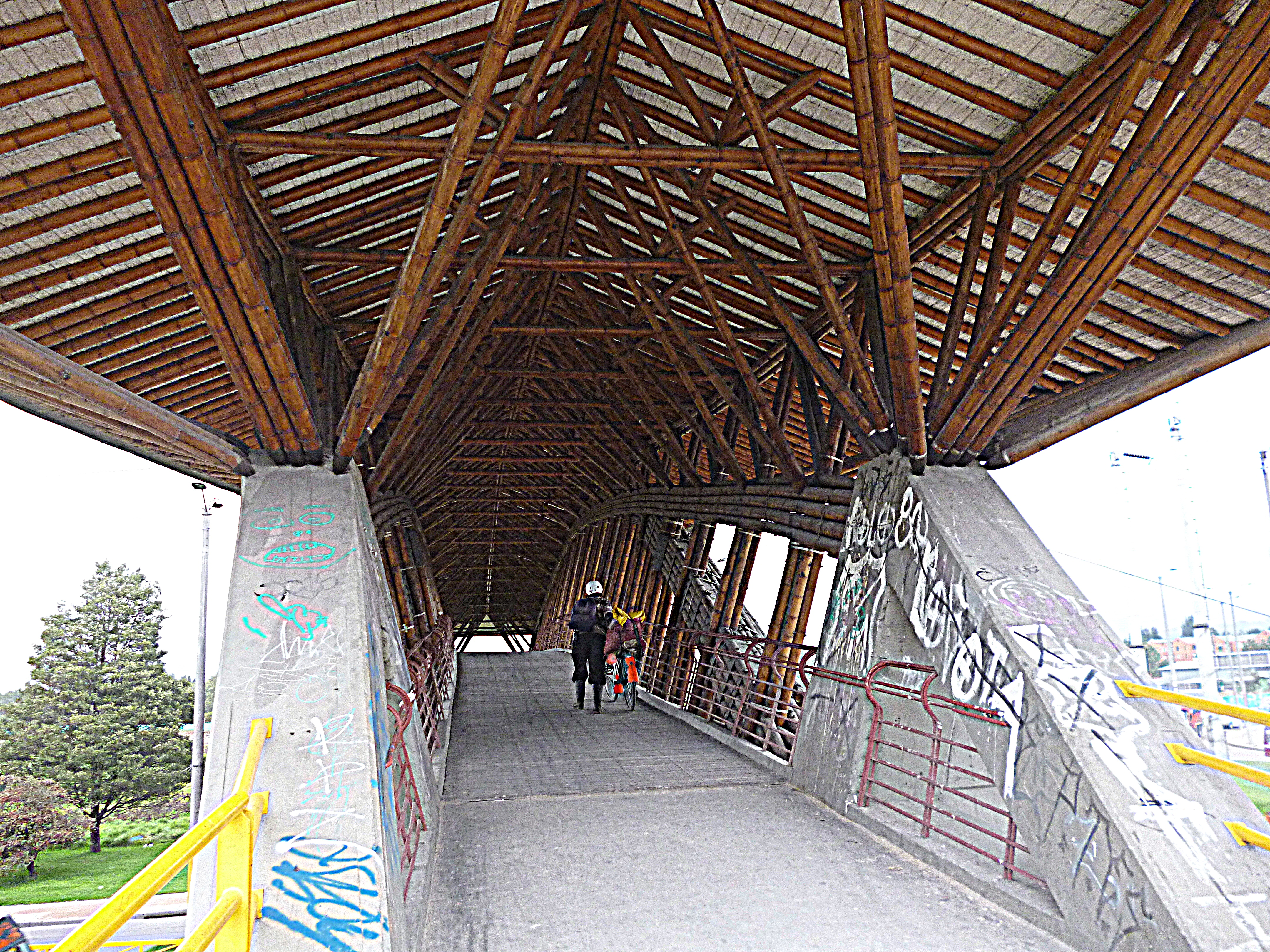 Interior del puente.